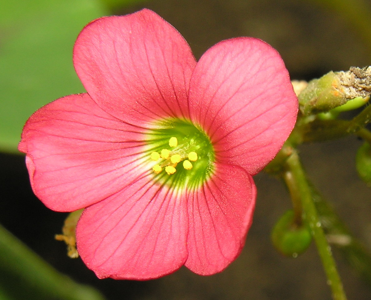 Valgomasis kiškiakopūstis (Oxalis tetraphylla), žiedas Šeima. Kiškiakopūstiniai (Oxalidaceae) Fotografavo: Algirdas, 2006 m. liepos 3 d., Lietuva